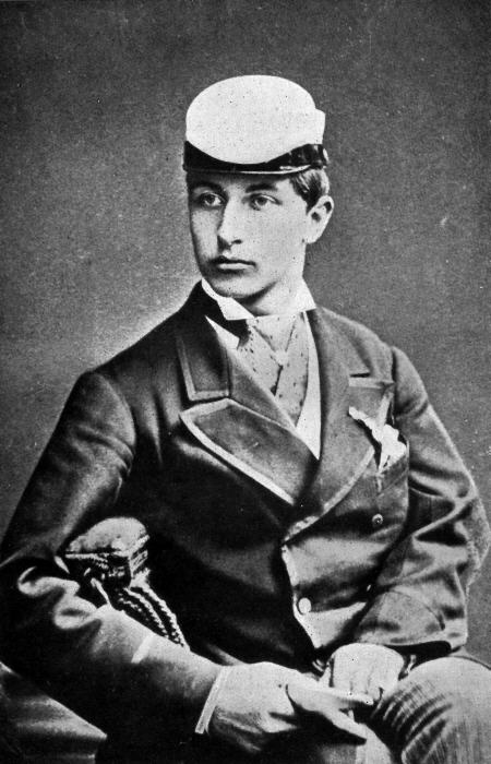 Wilhelm als Student in Bonn